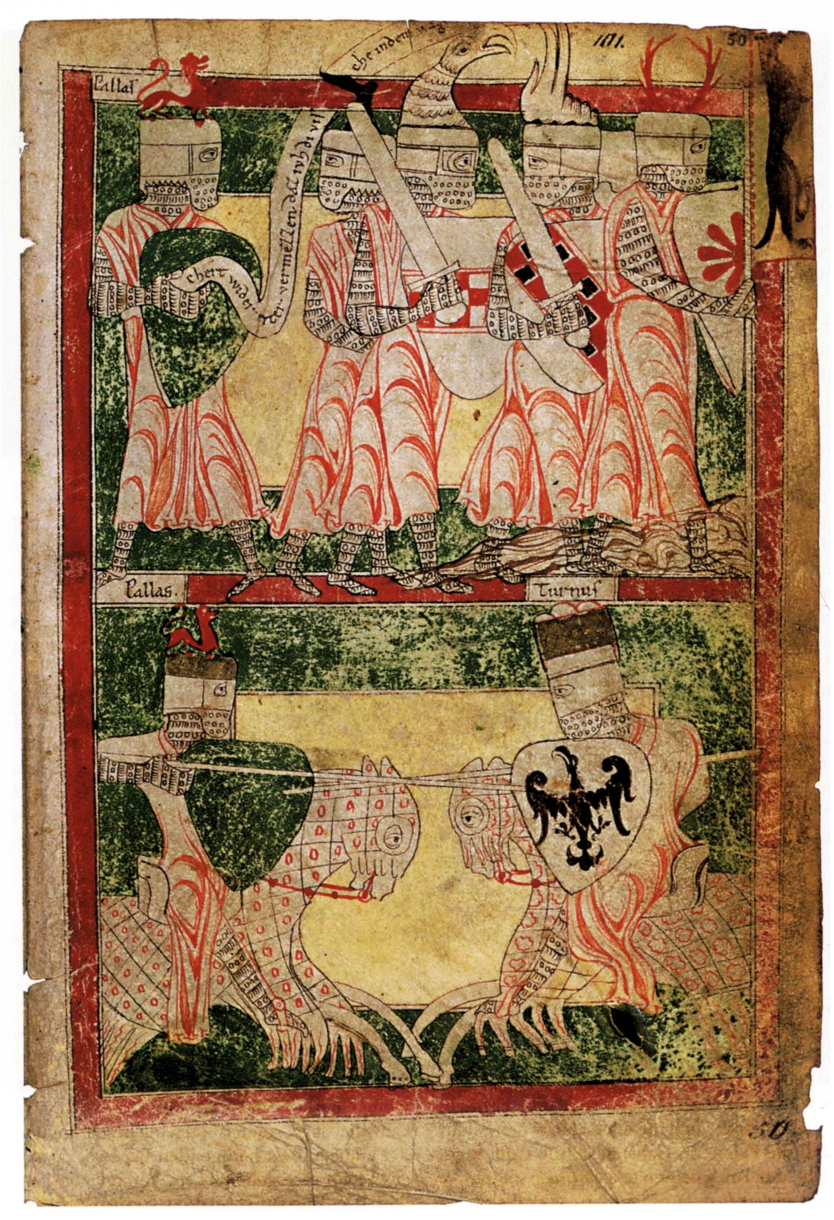 Illustration zum Aeneasroman Heinrich von Veldekes: Ritter vor dem Kampf und ein Zweikampf zu Pferde. Berlin, Staatsbibliothek Pr. Kb. Ms. Germ. Fol. 282, f. 50r